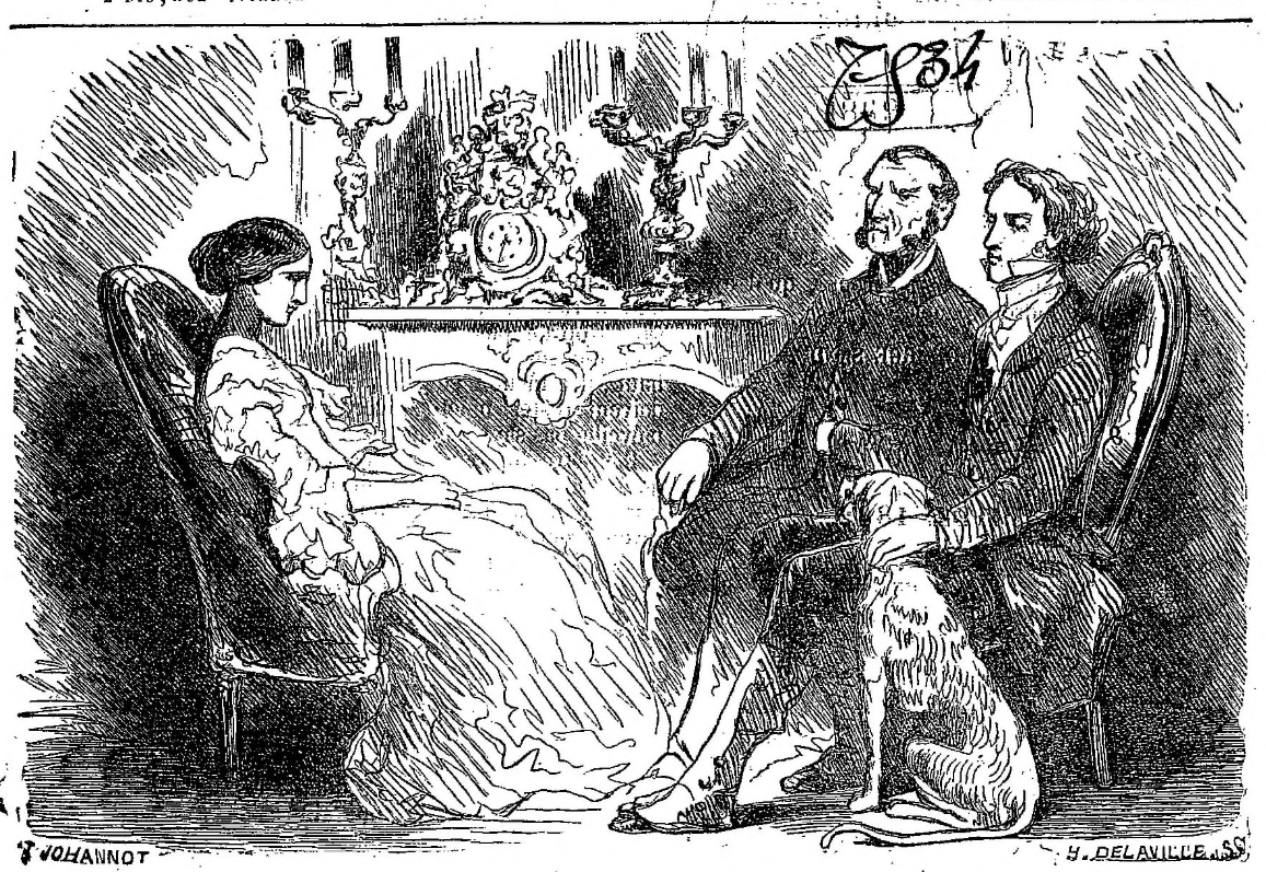 Illustration de Tony Johannot pour une réédition du roman "Indiana" de George Sand chez Hetzel (Paris) en 1861. Frontispice du roman montrant trois des personnages principaux : Indiana, le colonel Delmare et Ralph Brown. Scène de la première partie, chapitre 1.